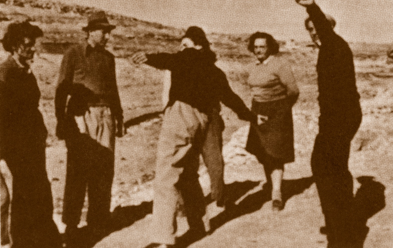 חברי ההגנה מתאמנים בהטלת רימון יד 1948 ארכיון ההגנה